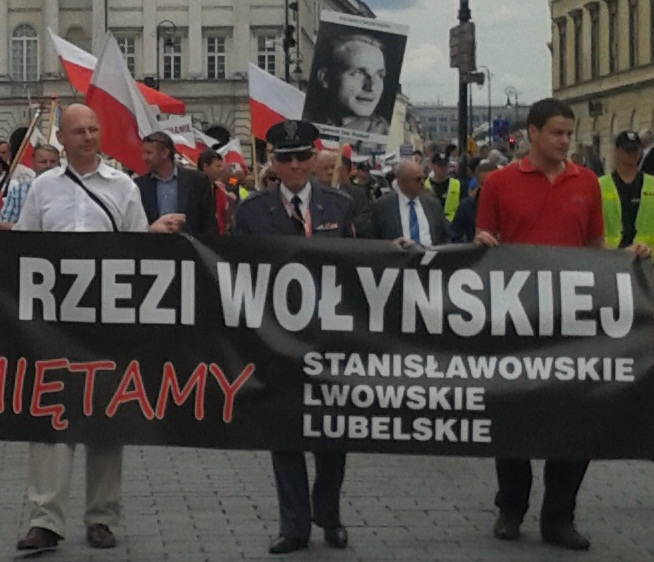 Portret Zygmunta Rumla niesiony podczas Marszu Pamięci 11.07.2013 w Warszawie